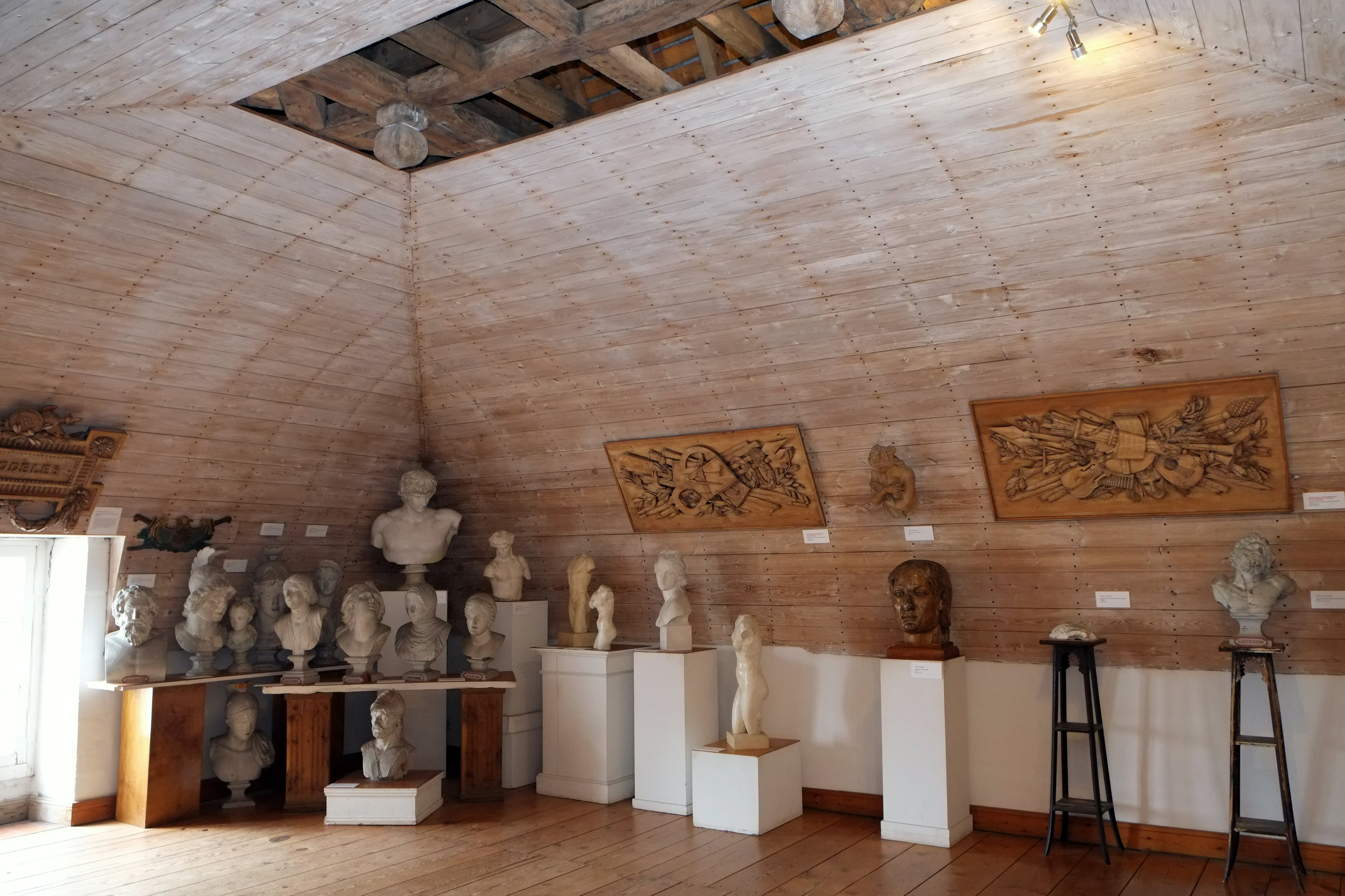 Salle des sculptures musée de la Marine Rochefort Charente-Maritime France